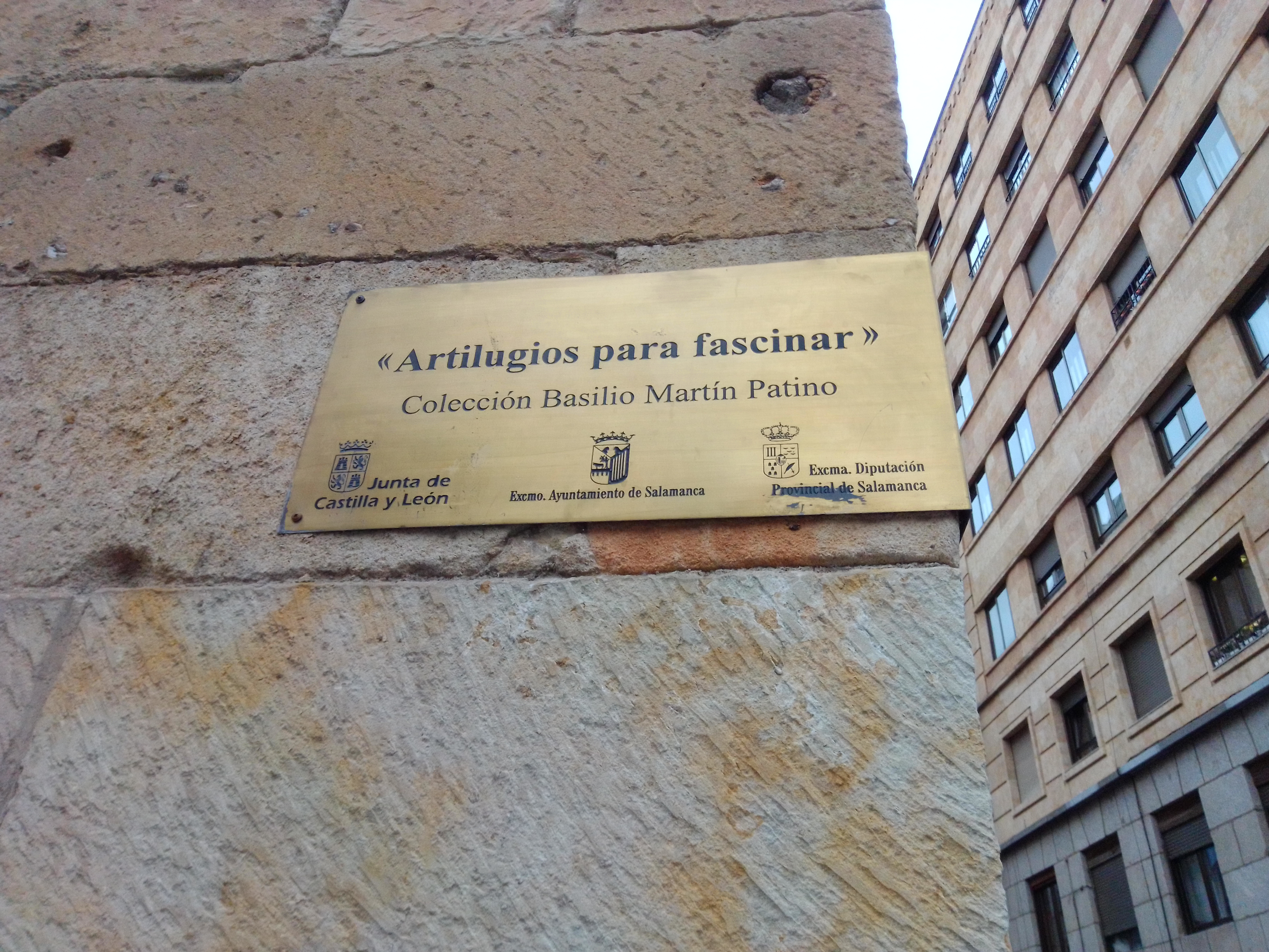 Basilio Martin Patino